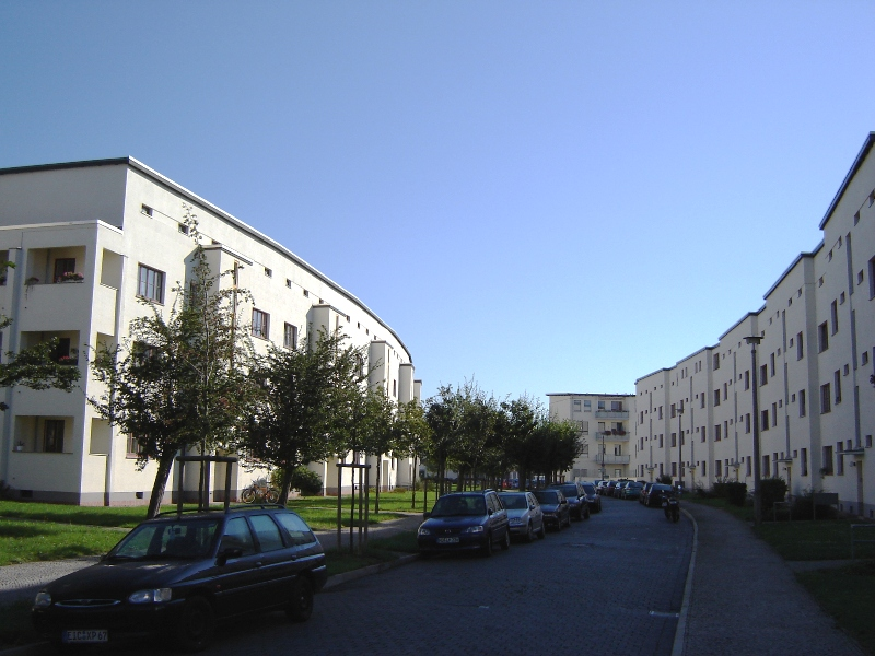 Cracau Siedlung in Magdeburg (Germany)